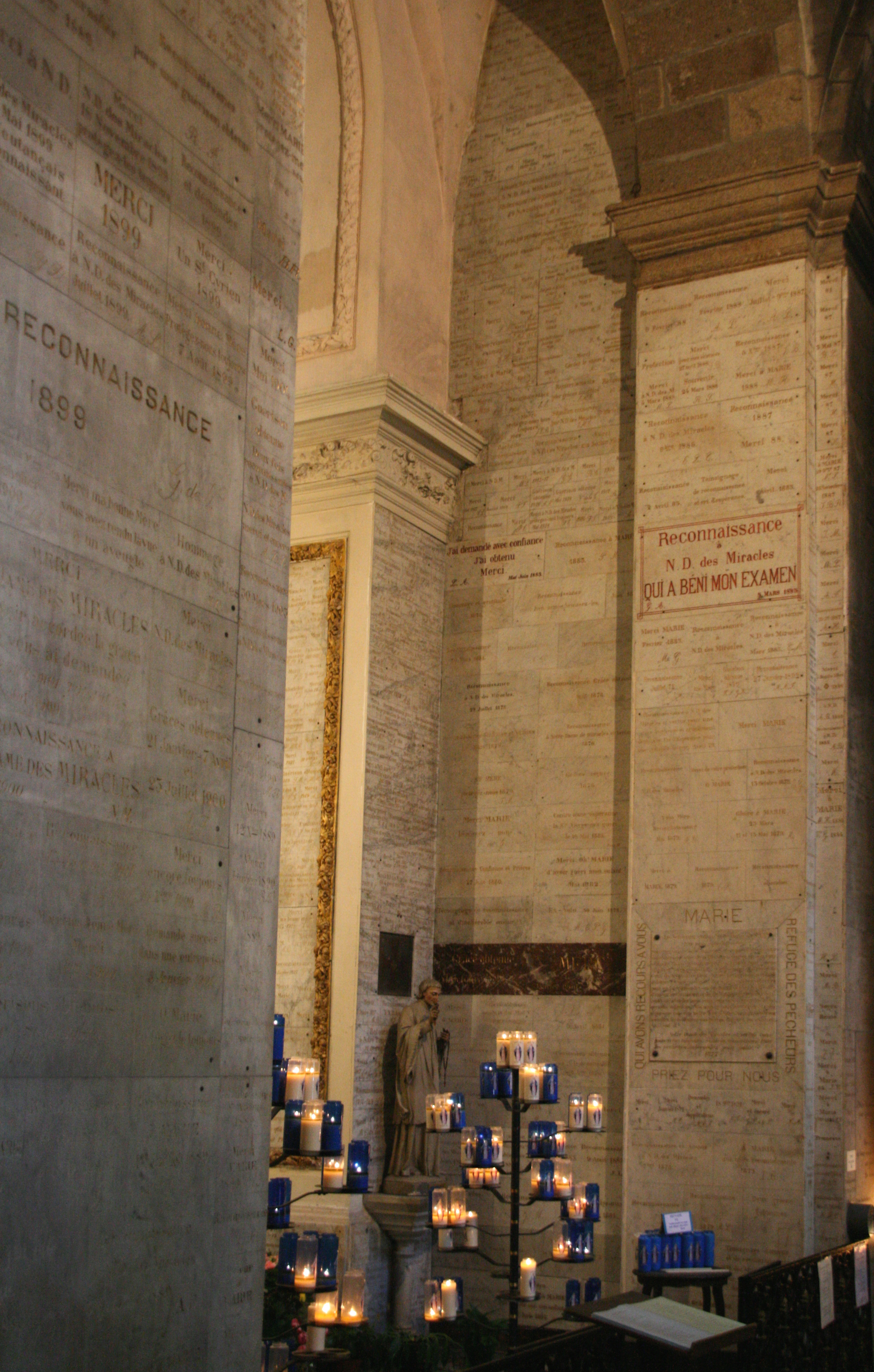 Mur d'ex-voto dans l'église Saint-Sauveur de Rennes.